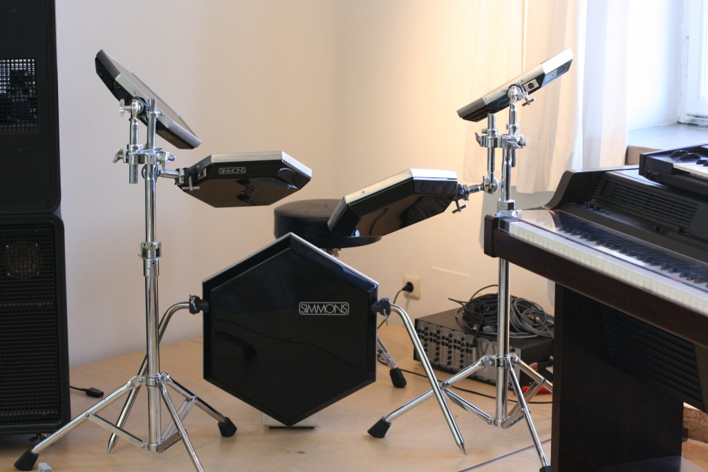 Erstes elektronisches Drumkit.